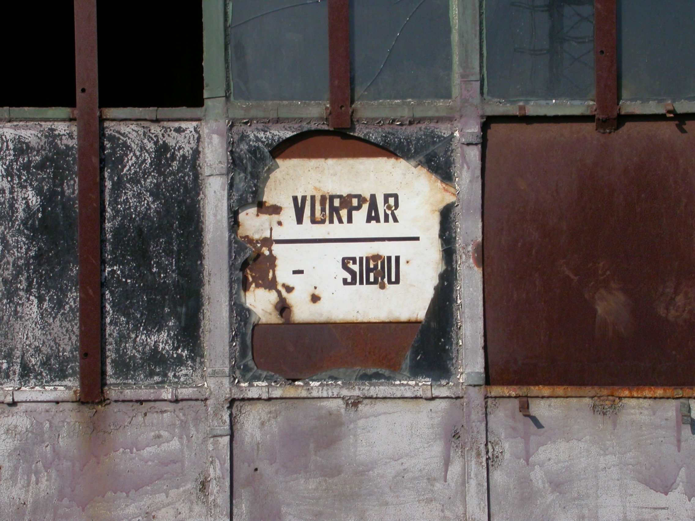 Remiza de locomotive pentru calea ferată îngustă, 1898 - 1910 70